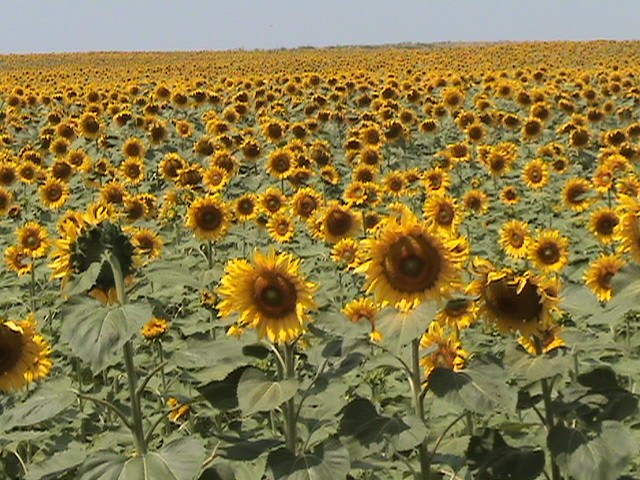 EKILOREA - GIRASOL (Helianthus annuus)(eguzkilorea, Carlina acaulis da)